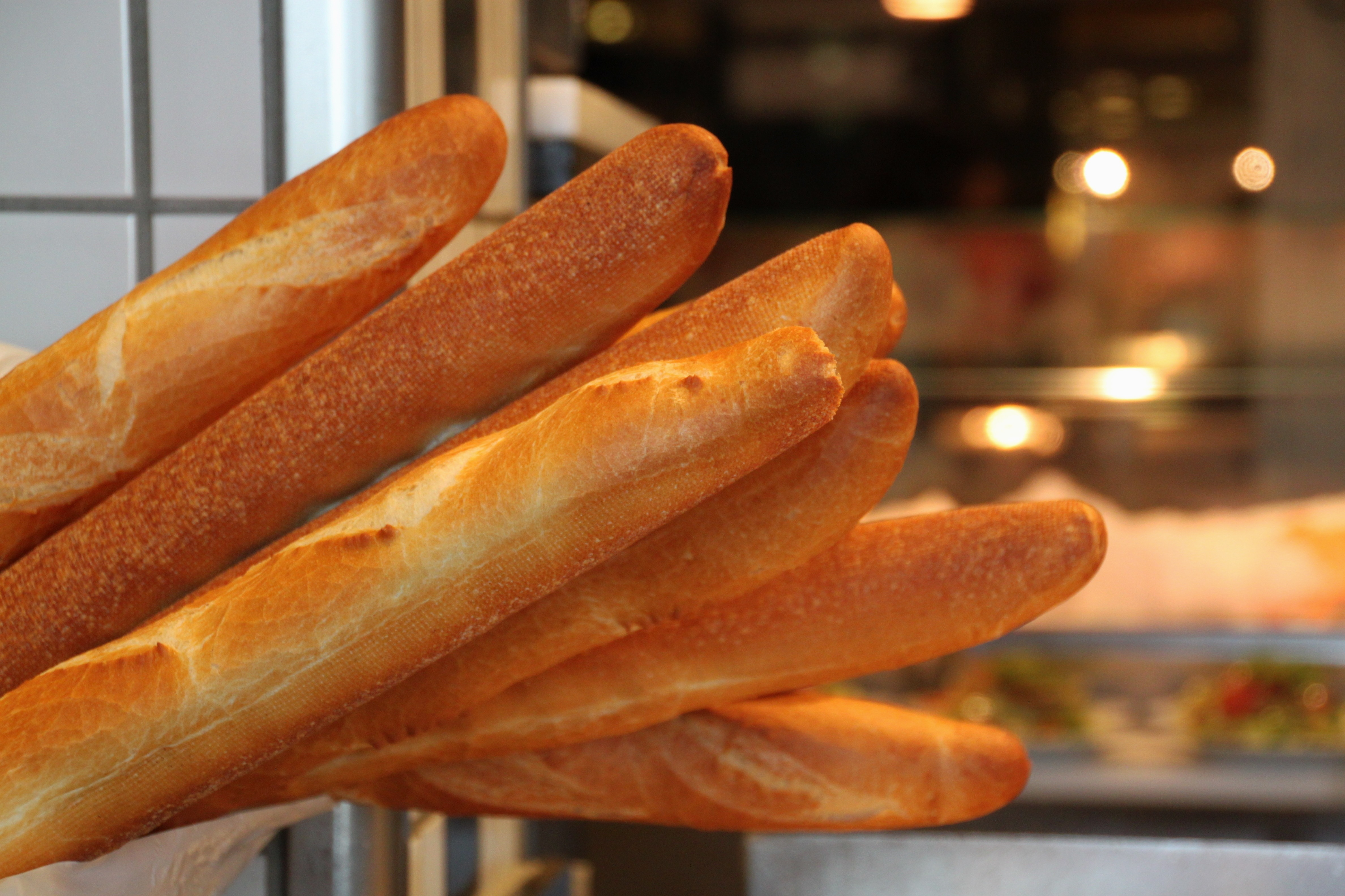 Zdjęcia obrazujące 6 rodzajów pieczywa: rogal, chleb ciemny, chałka, bagietka, kajzerka, sucharki English | Polski | +/−